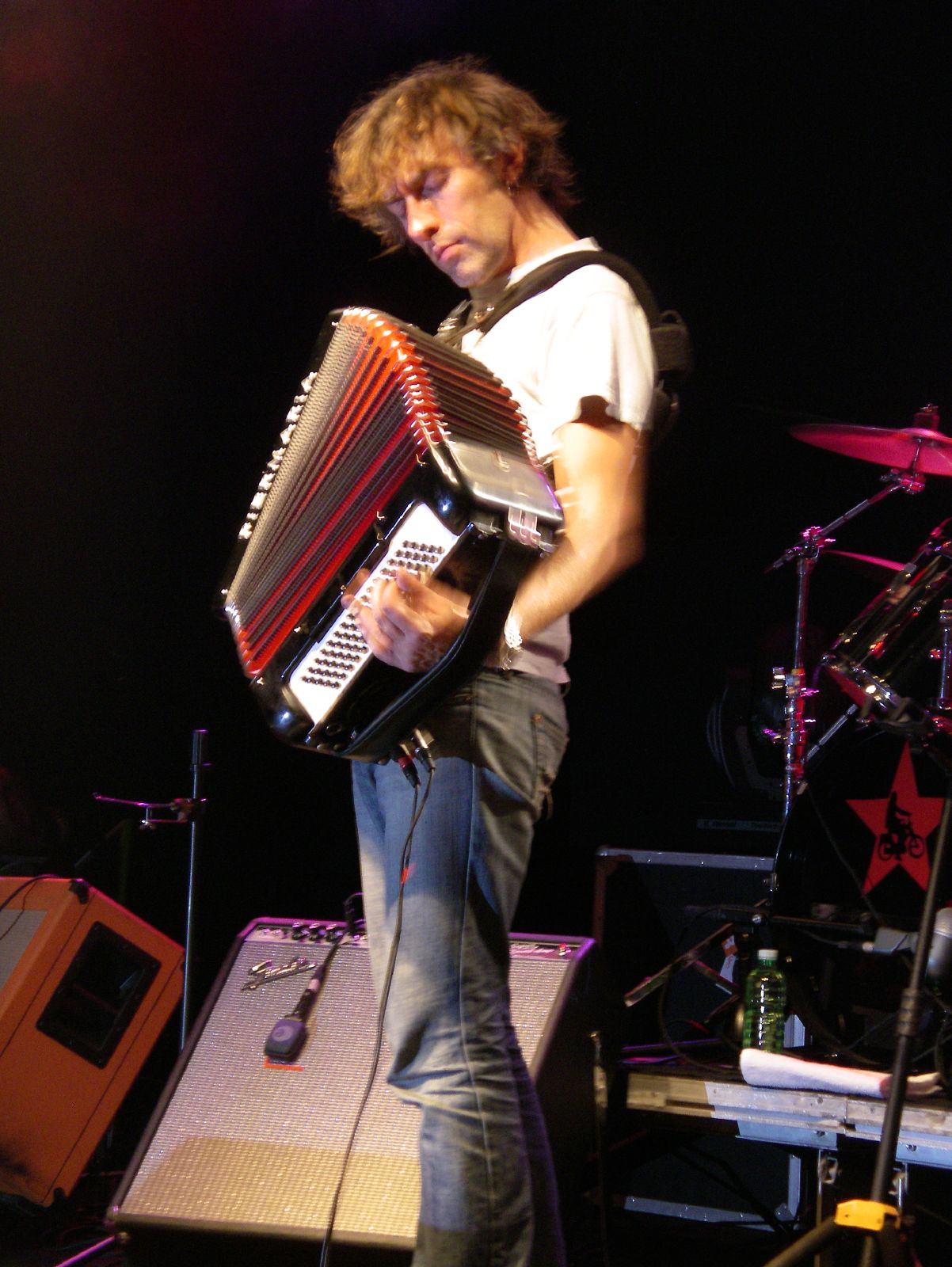 Yann Tiersen live